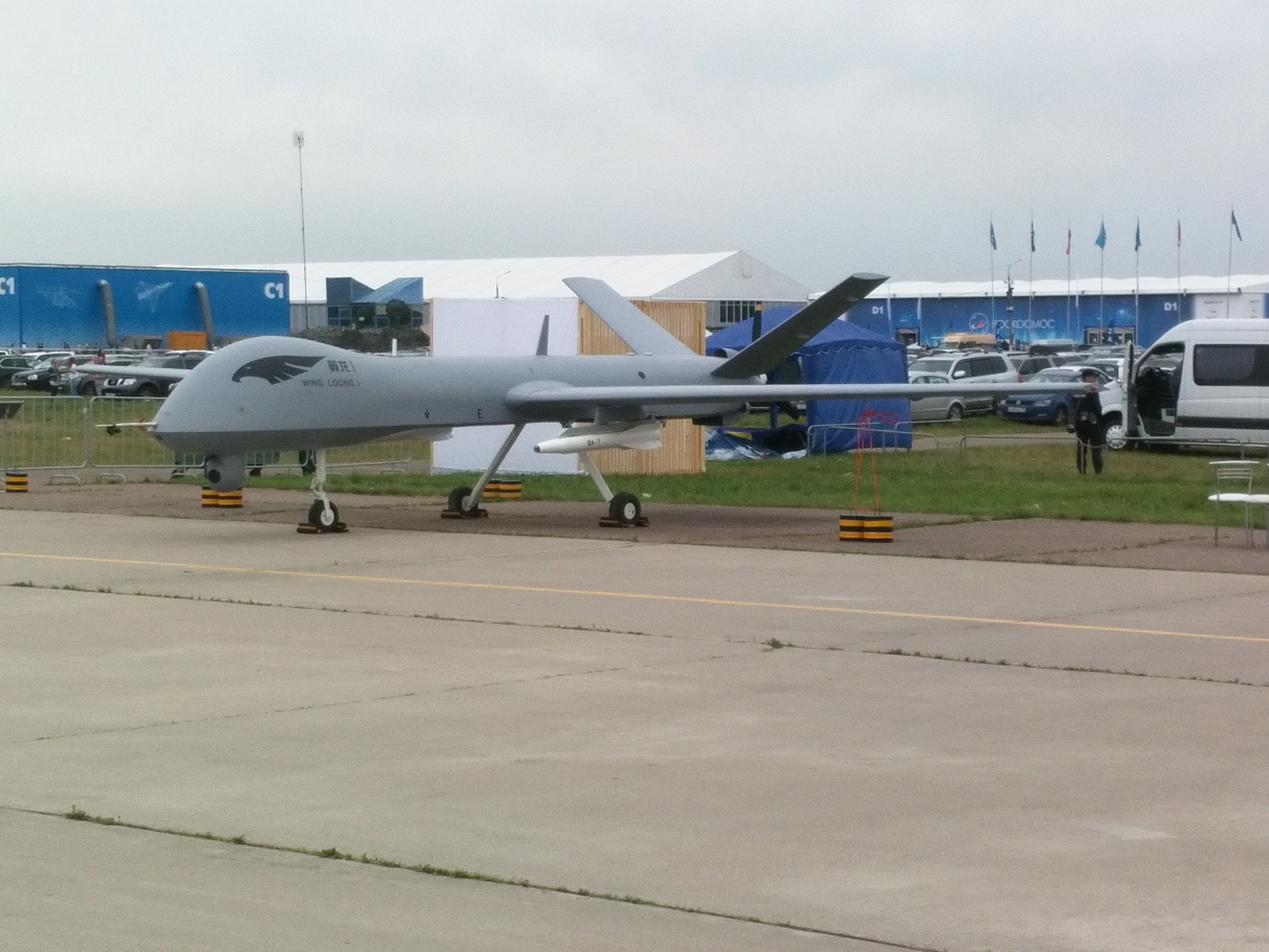 Wing loong MAKS2017